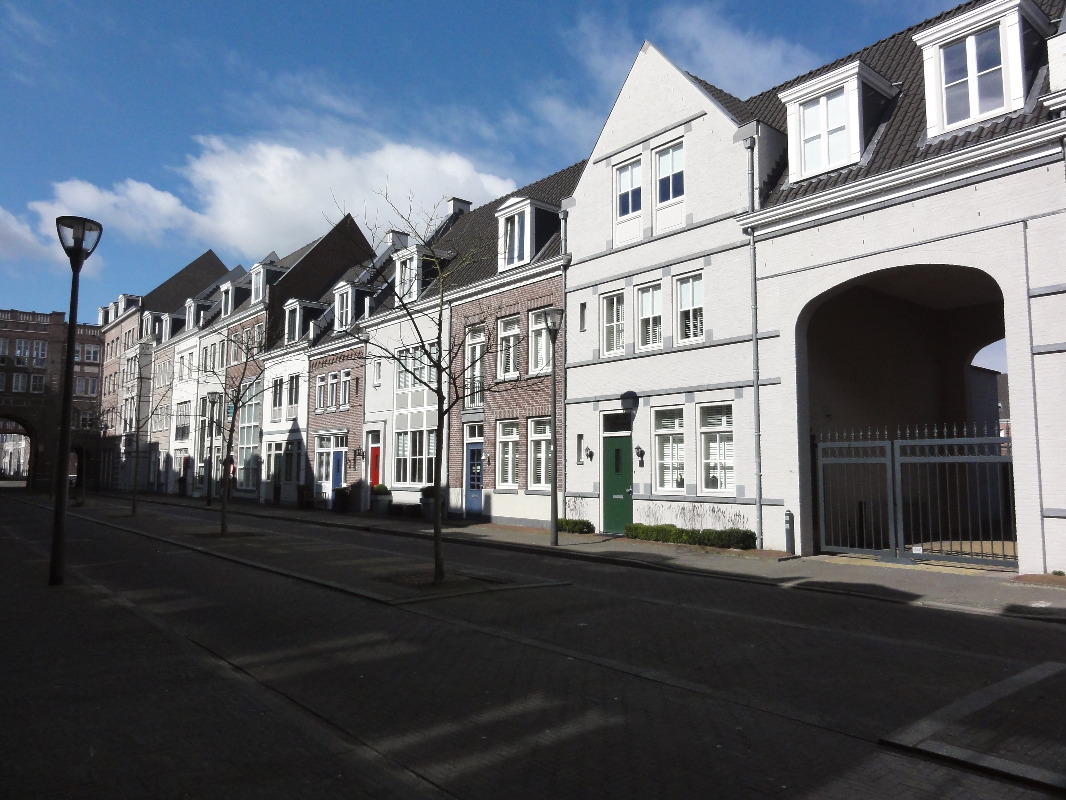 Brandevoort